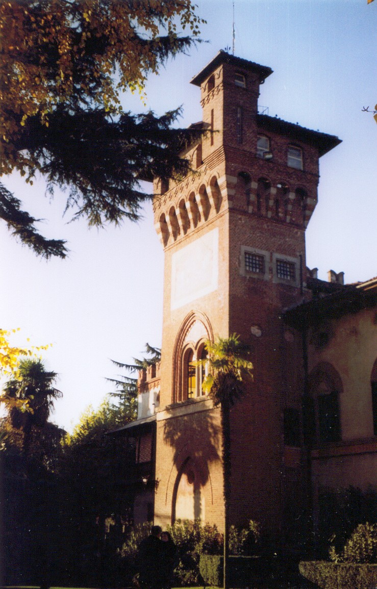 Castello di Mazzè, in Canavese, provincia di Torino, Piemonte, Italia.